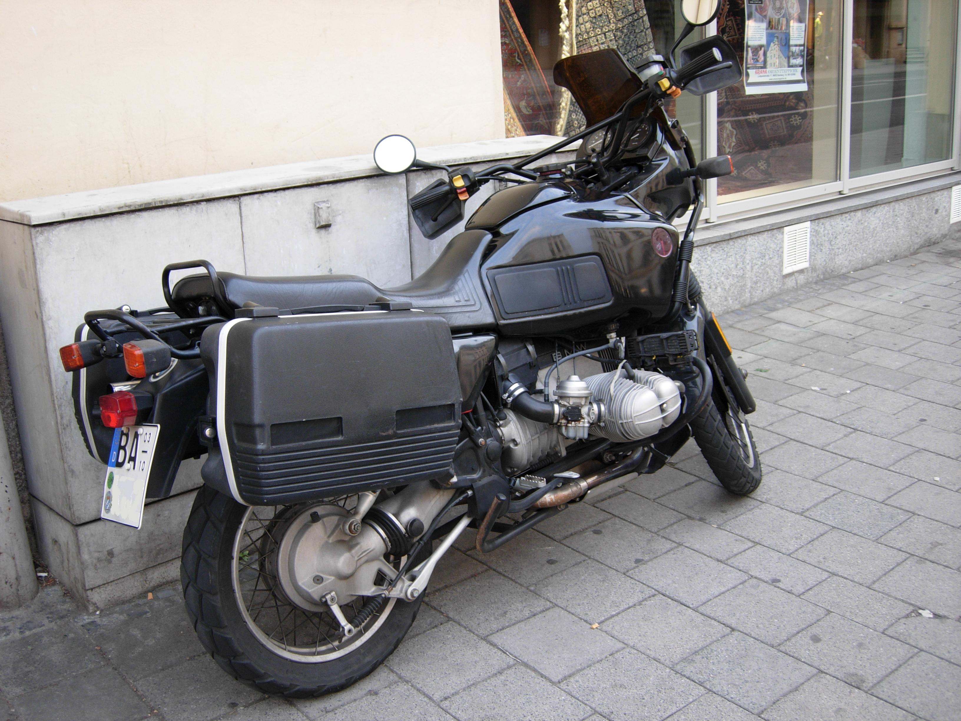 BMW-Motorrad in Bamberg